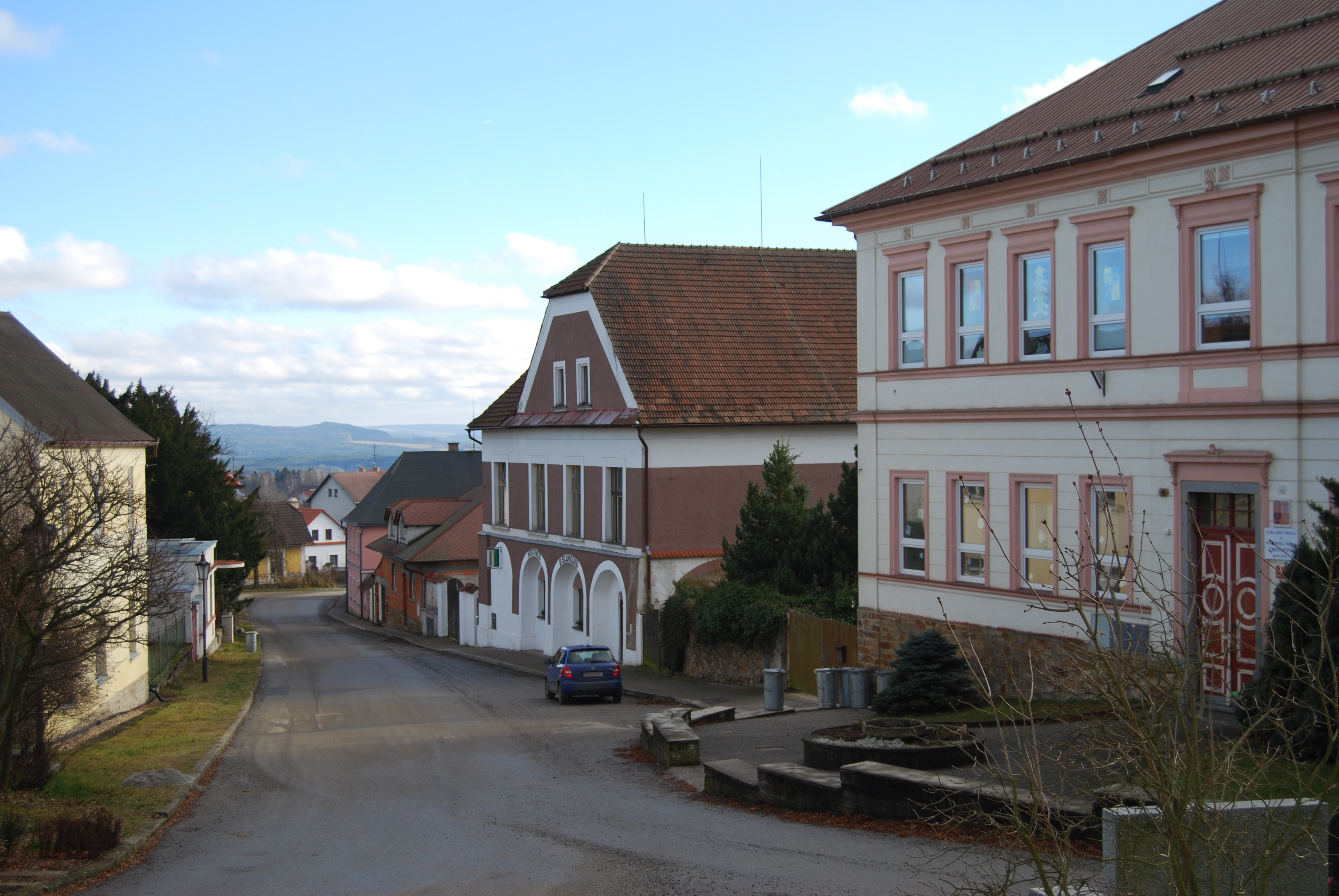 Základní škola. Chotoviny v okrese Tábor v Jihočeském kraji. Česká republika. - OpenStreetMap (Info)